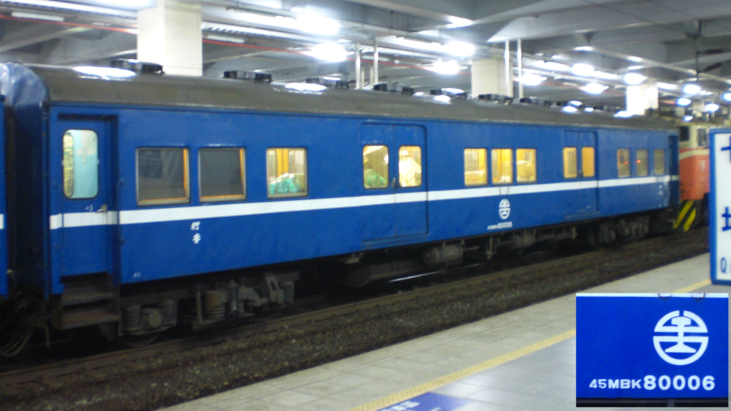 2012年12月19日，臺灣鐵路管理局郵政行李車MBK80006停靠七堵車站第二月臺。